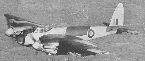 de Havilland Mosquito fighter